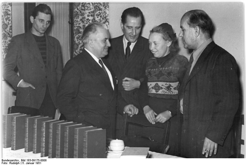 Illus-Rudolph 5.1.51 1. Buchserie fortschrittlicher Schriftsteller erscheint. Die ersten zehn Bände der Bibliothek fortschrittlicher Schriftsteller, die nach der Kulturverordnung der DDR vom 16.3.50 herausgegeben wird, erscheinen jetzt. Aus diesem Anlass fand am 5.1.51 im Kulturbundhaus in Berlin eine Pressekonferenz statt. UBz: Diskussionsgruppe v.l.n.r.: Willi Bredel, Dr. Engel (Direktor der Akademie der Künste), rechts aussen Prof. Wieland Herzfelde.